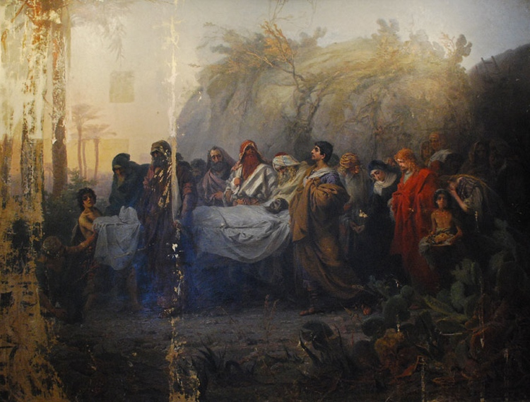 Эскиз